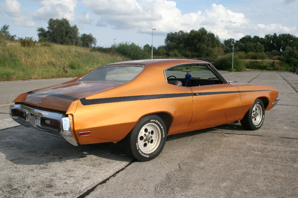 1972 Buick Skylark